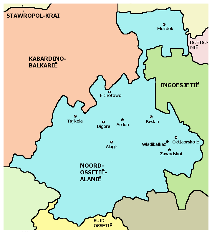 Afrikaanse kaart van Noord-Ossetië-Alanië